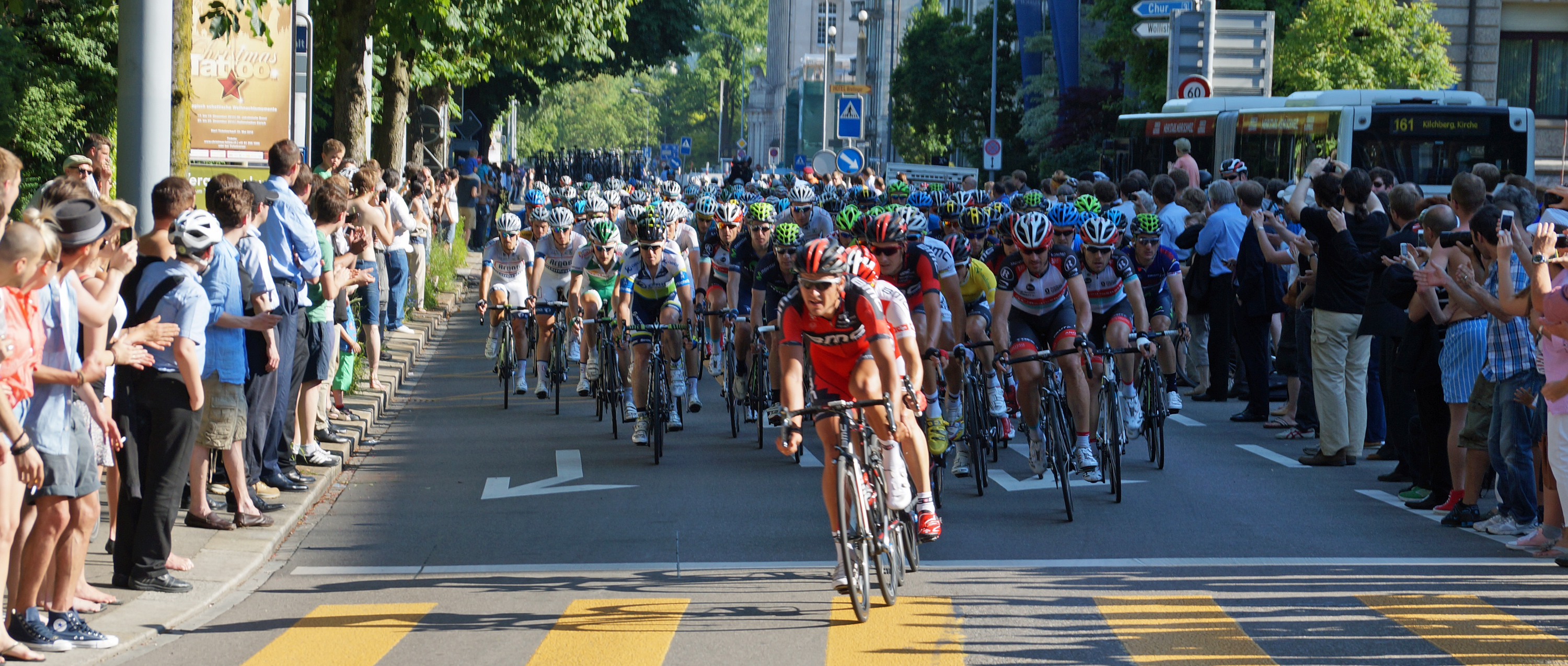 Tour de Suisse 2013 in Zürich – Feld mit viel Rückstand